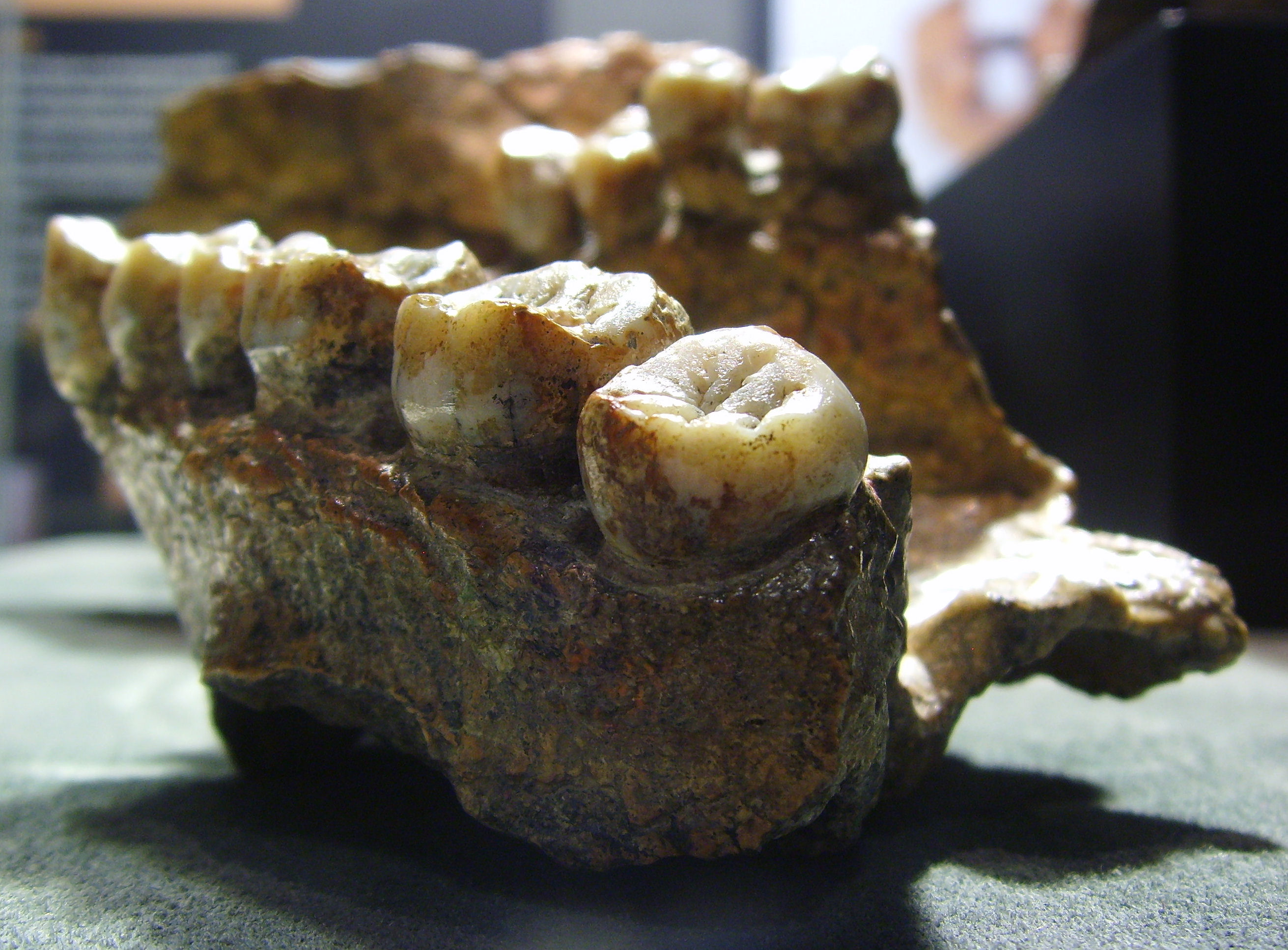 Palate (Oberkiefer und Gaumen) "Sangiran IV" (Original; 1,6 mya) of Homo erectus, collection Koenigswald (from 1939), Senckenberg-Museum, Frankfurt am Main, Germany